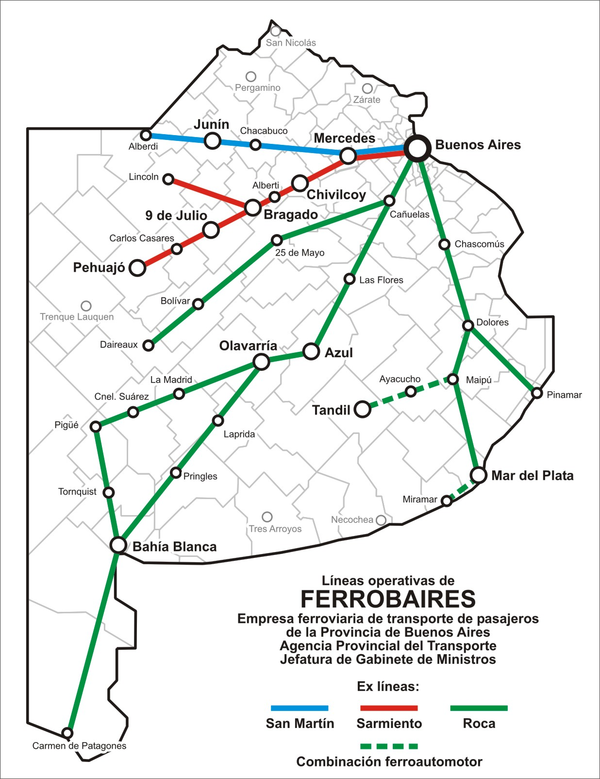 Líneas operativas de Ferrobaires en 2011.